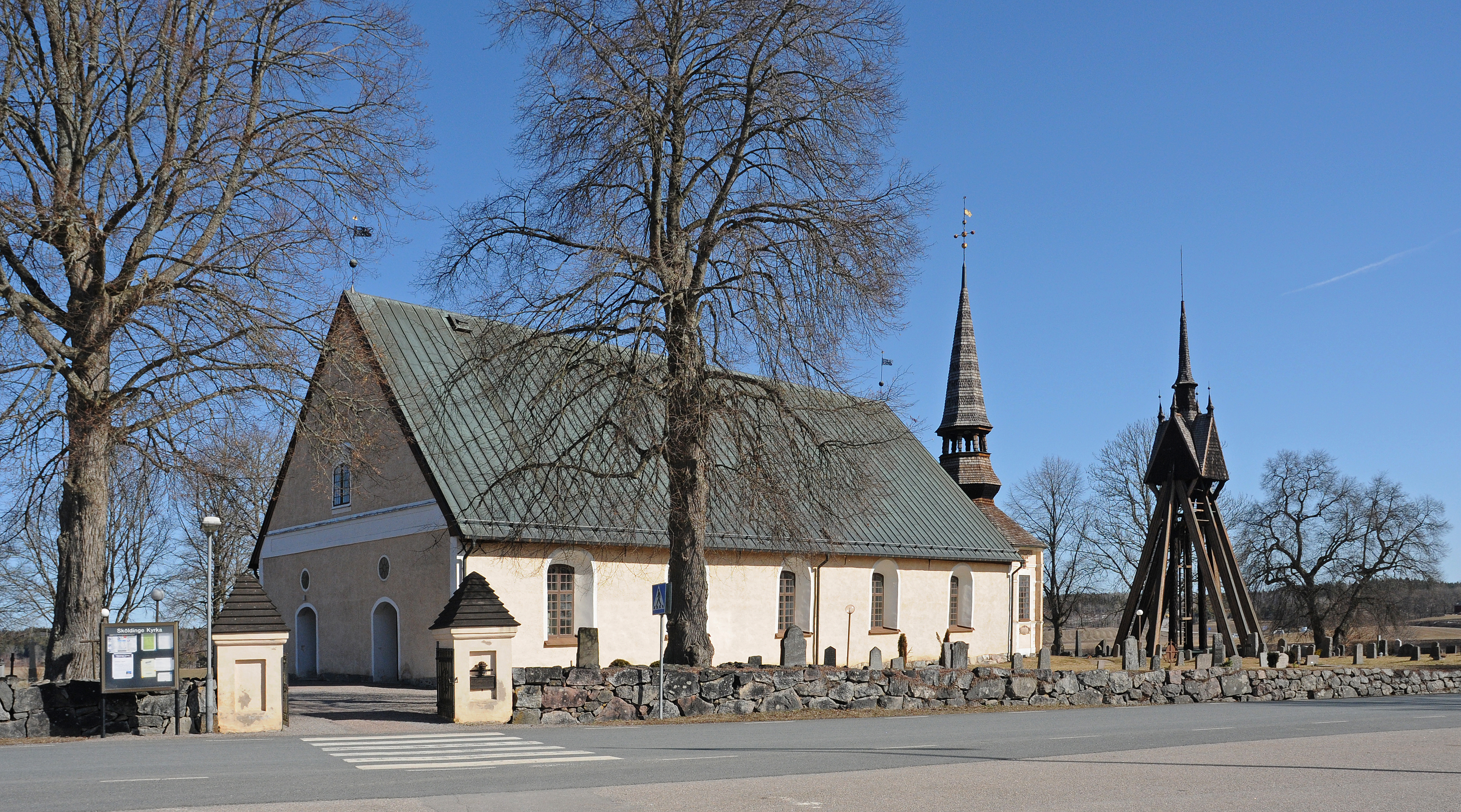 Sköldinge kyrka i Katrineholms kommun